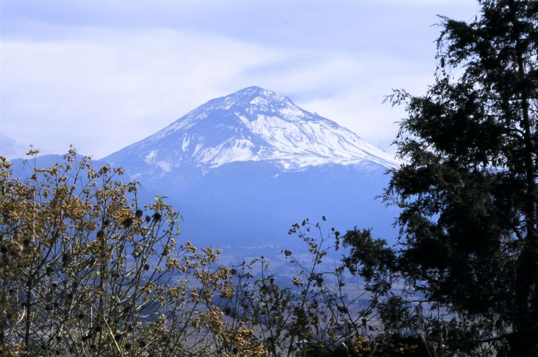 Vulcão Popocatépetl visto do Sacromonte, Amecameca, México.